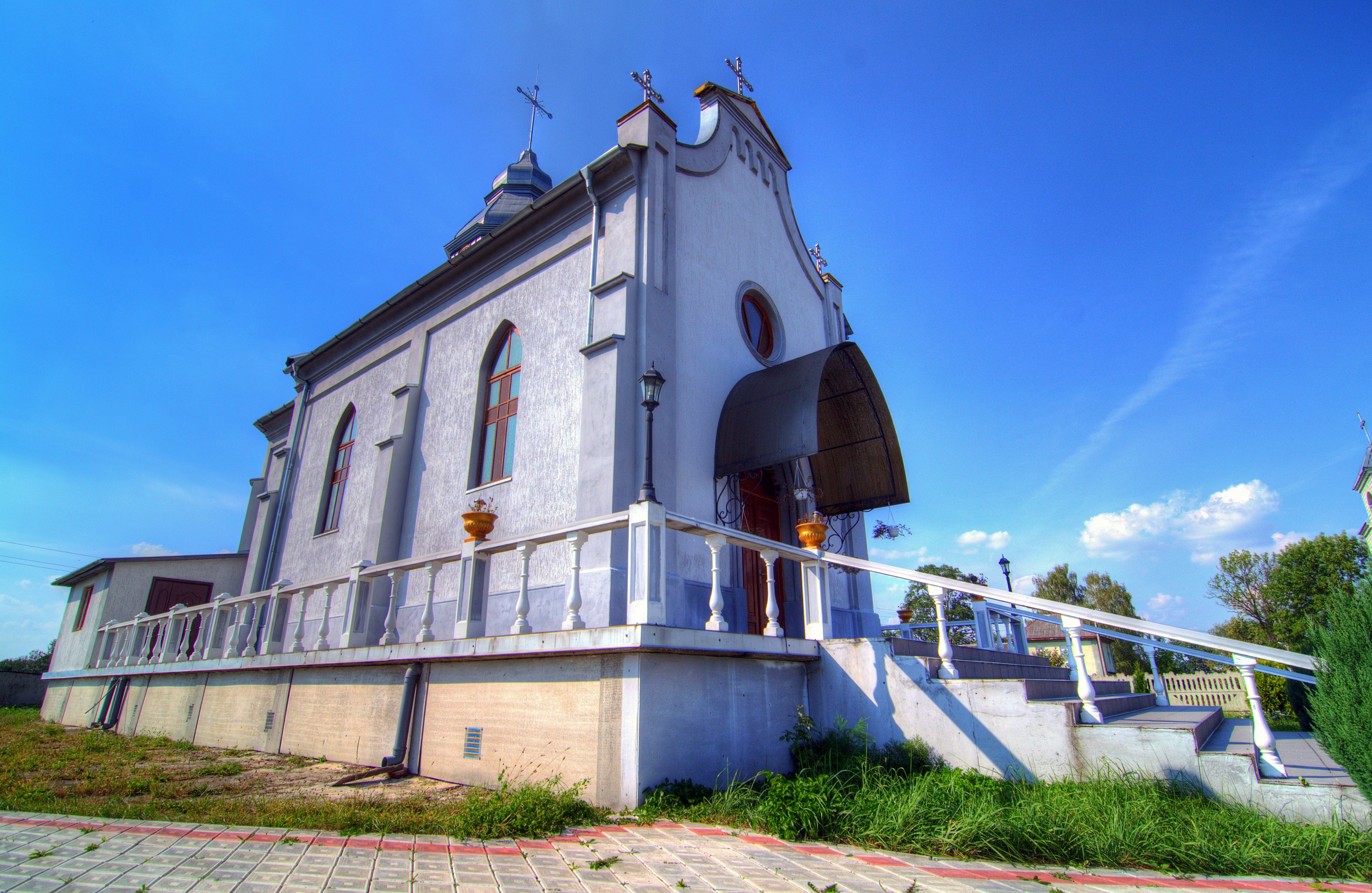 Мурована церква